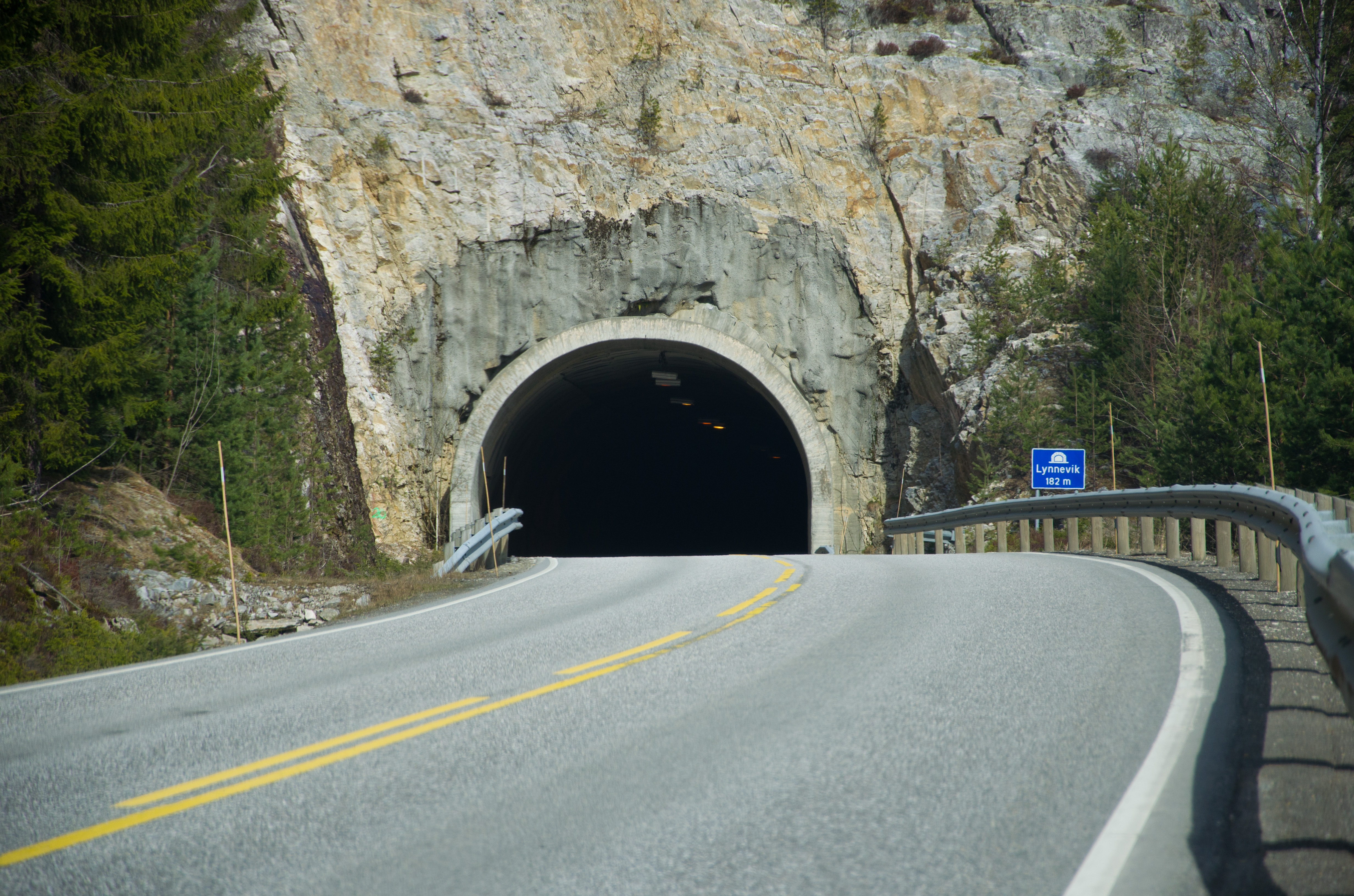 Lynneviktunnelen på fylkesvei 37 i Notodden